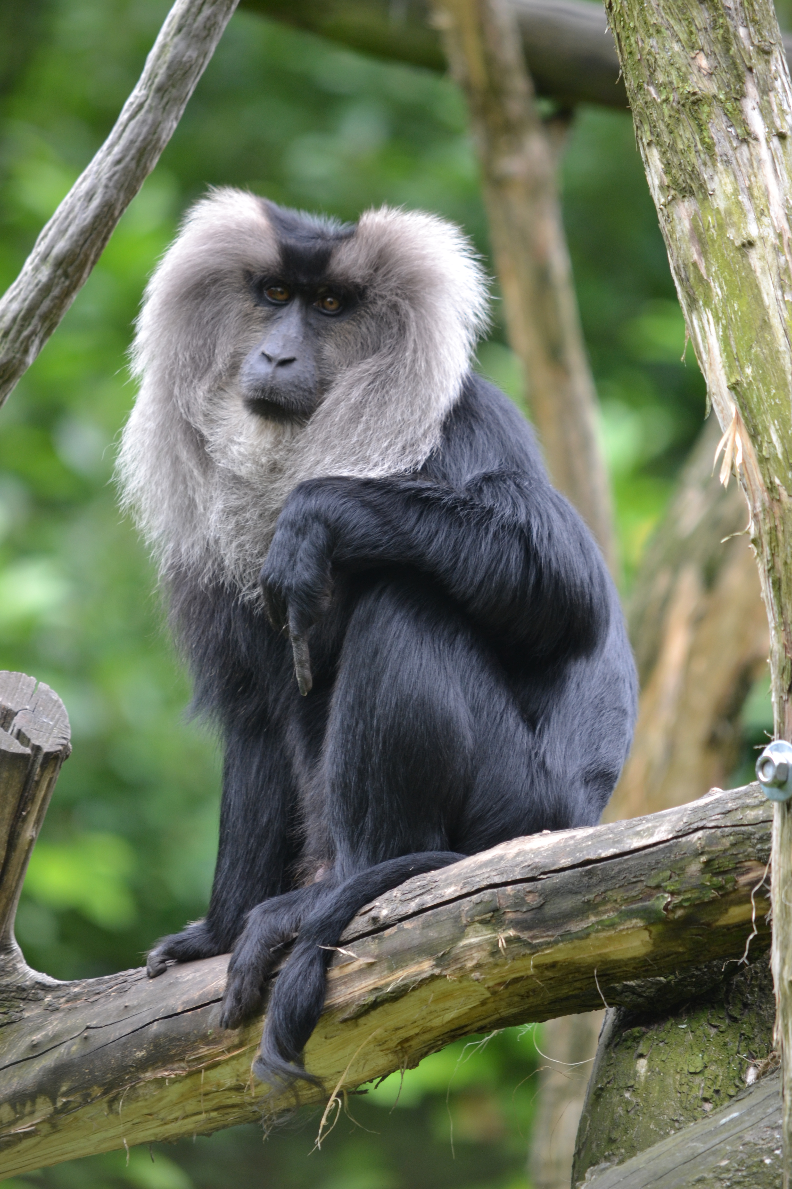 Deze foto is gemaakt in Diergaarde Blijdorp. This picture was taken at Rotterdam Zoo.